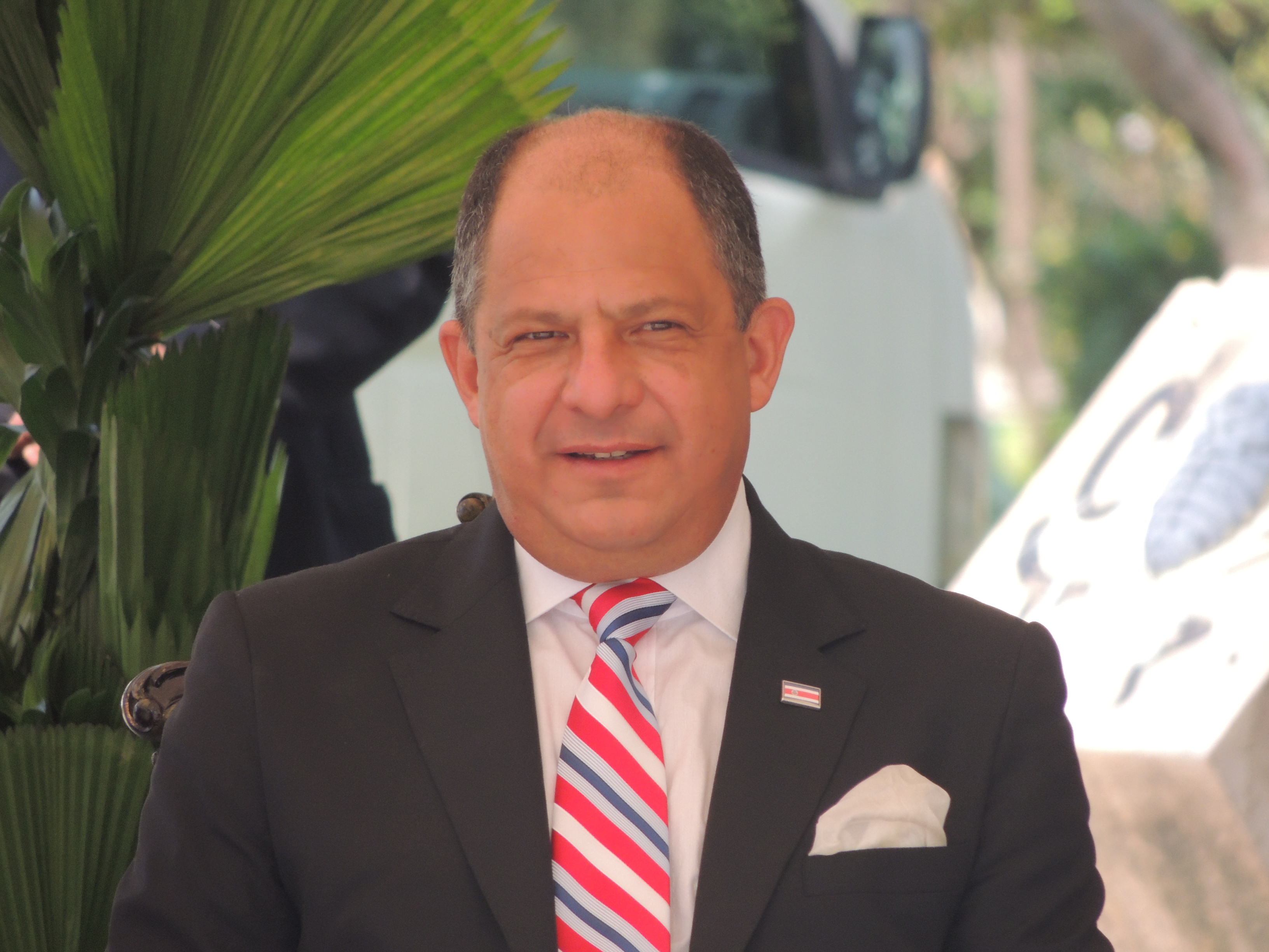 Luis Guillermo Solís, Presidente de Costa Rica